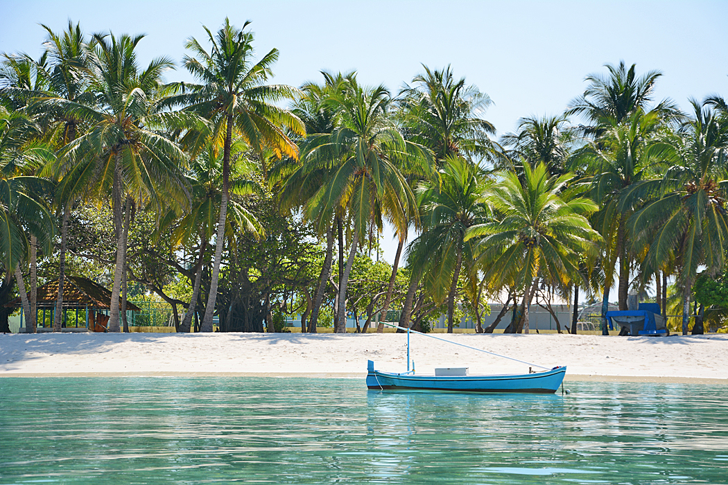 Hanimaadhoo Island, Haa Dhaalu Atoll, Malediven